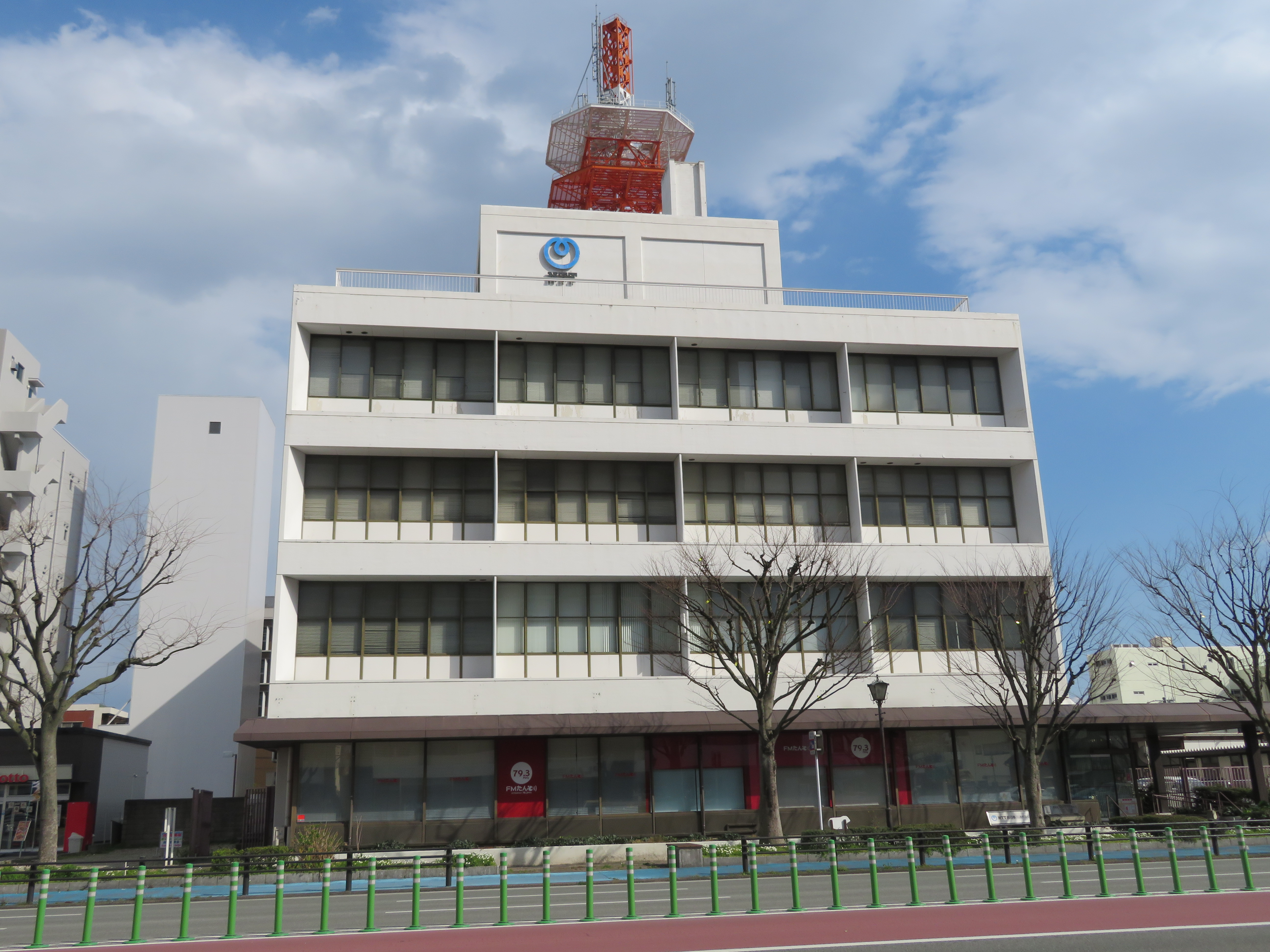 株式会社有明ねっとこむ本社が所在するＮＴＴ大牟田ビル Canon PowerShot SX720 HS